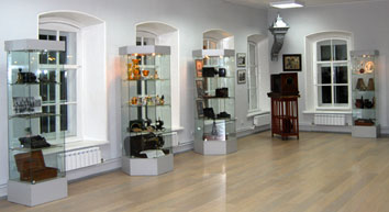 Один из залов Музея русской предприимчивости в с. Вятское